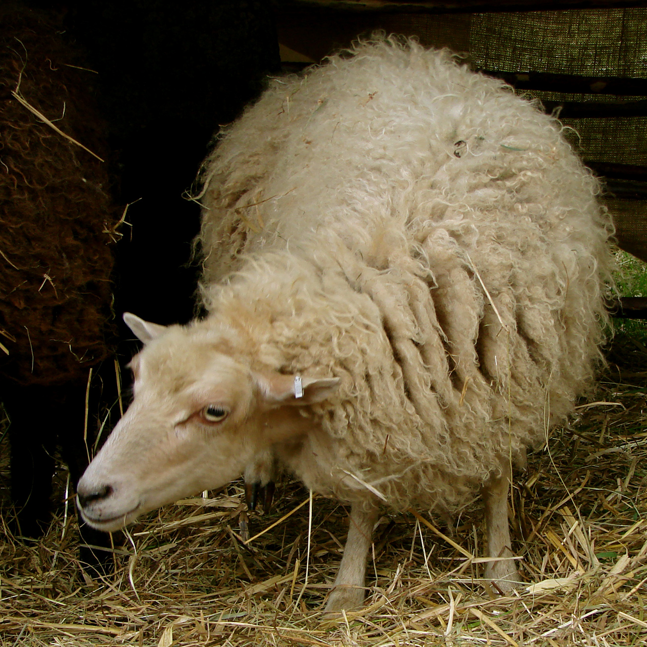 Mouton d'Ouessant: brebis.